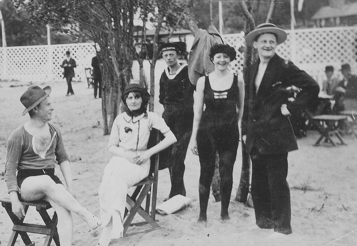 Badande ungdomar vid Hässelby strandbad